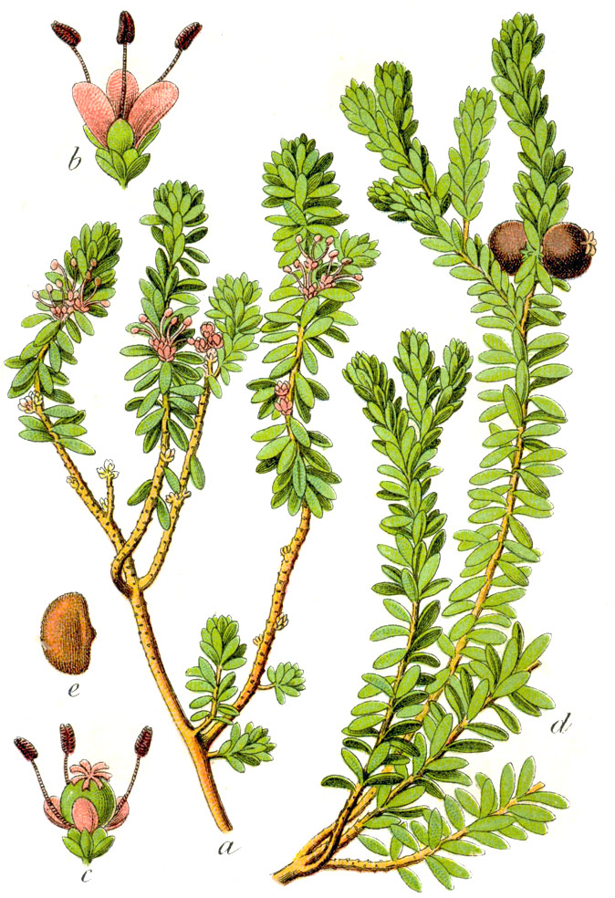 Empetrum nigrum L. s. str. Original Caption Krähenbeere, Empetrum nigrum